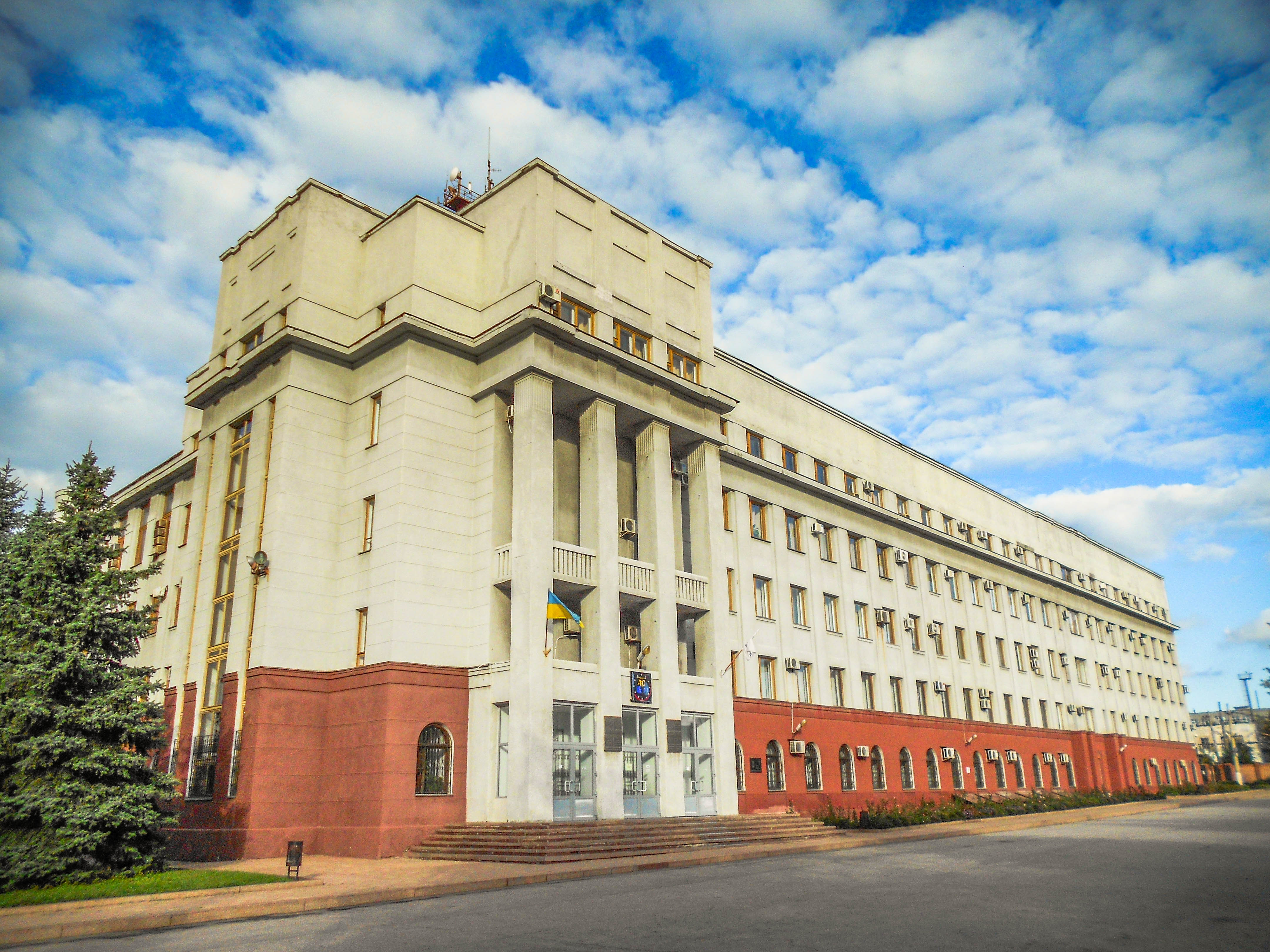 Адміністративний будинок виробничого об'єднання "Донбасенерго", Горлівка, пр.Леніна, 11